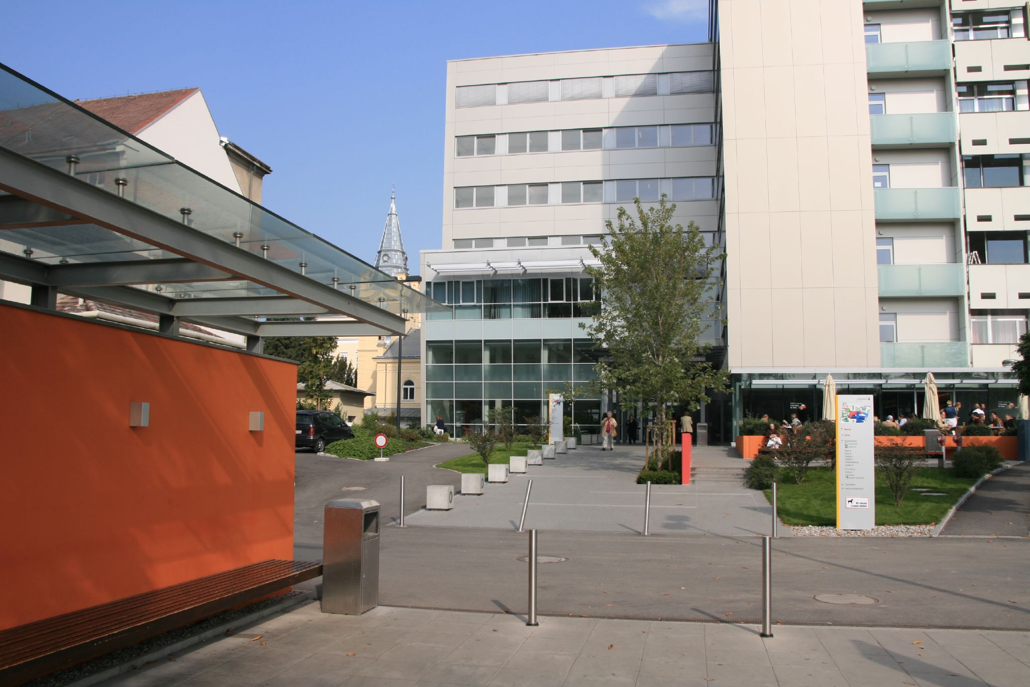 Das Landesklinikum St. Pölten, In der Mitte das Haus B, Rechts das Haus A. links hinter dem Glasdach ist die Denkmalgeschützte Kapelle zu erkennen.